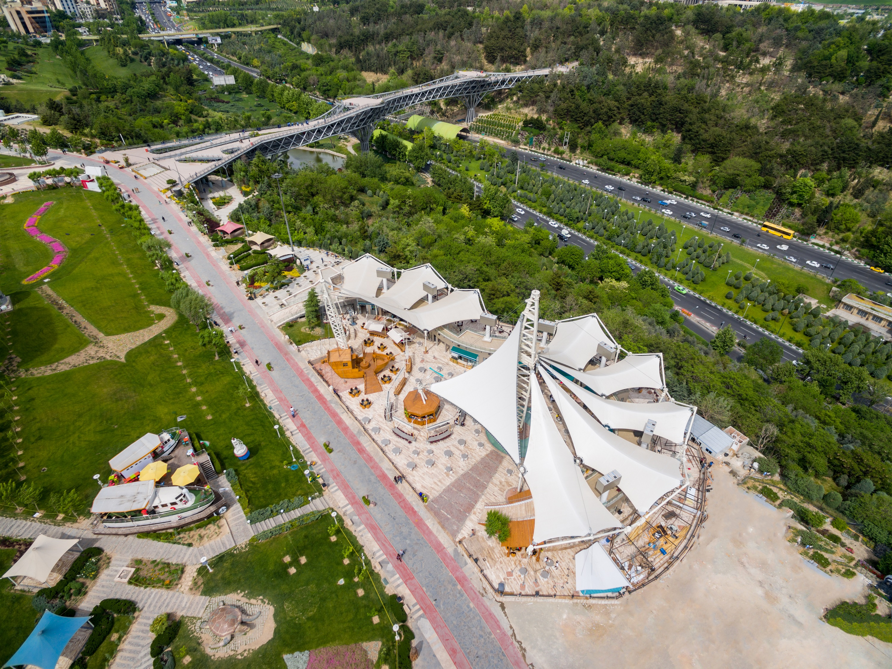 سازه های چادری رستوران دریایی پارک آب و آتش - شرکت دیبا